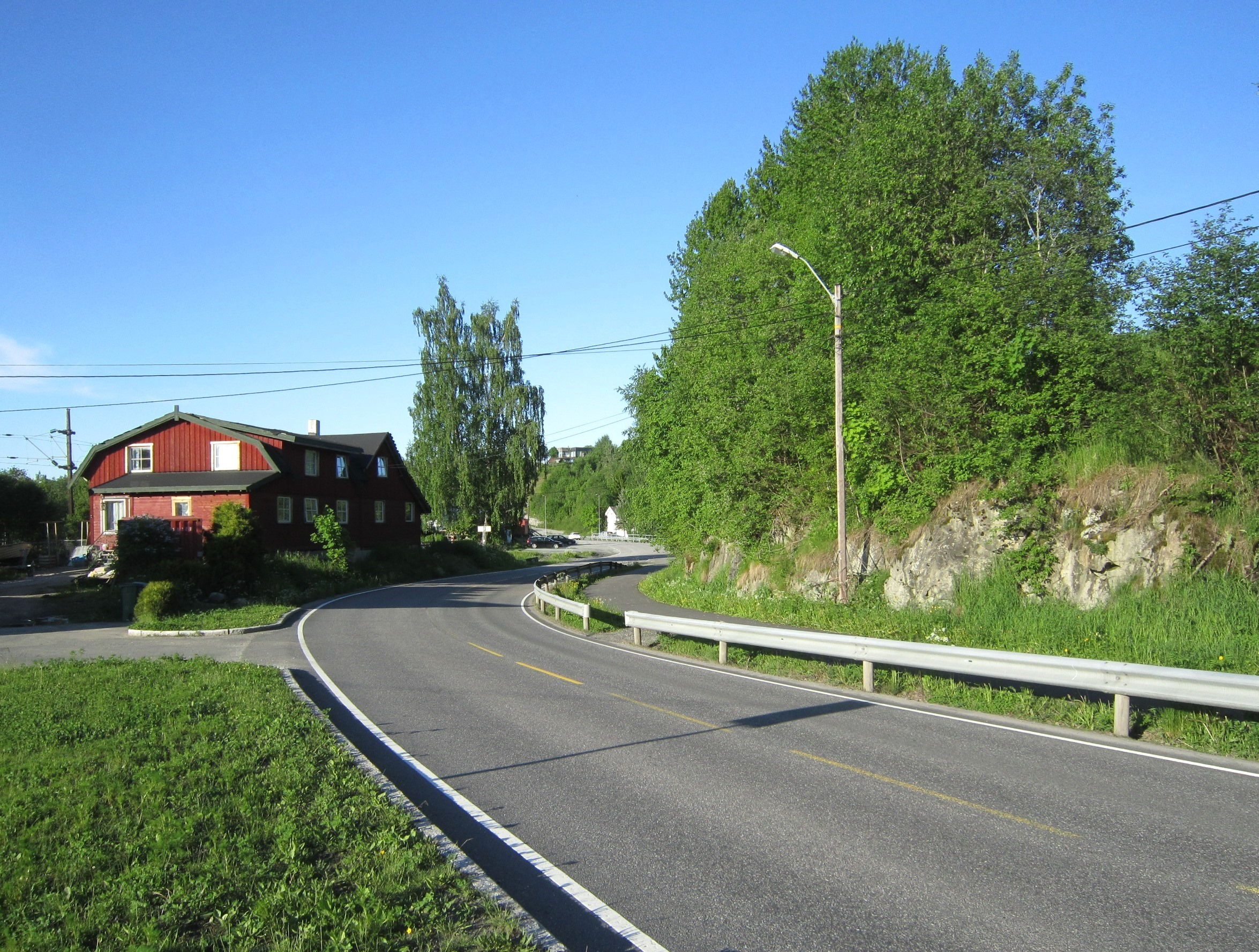 Primær fylkesvei 172 like sør for Svingen holdeplass på Kongsvingerbanen